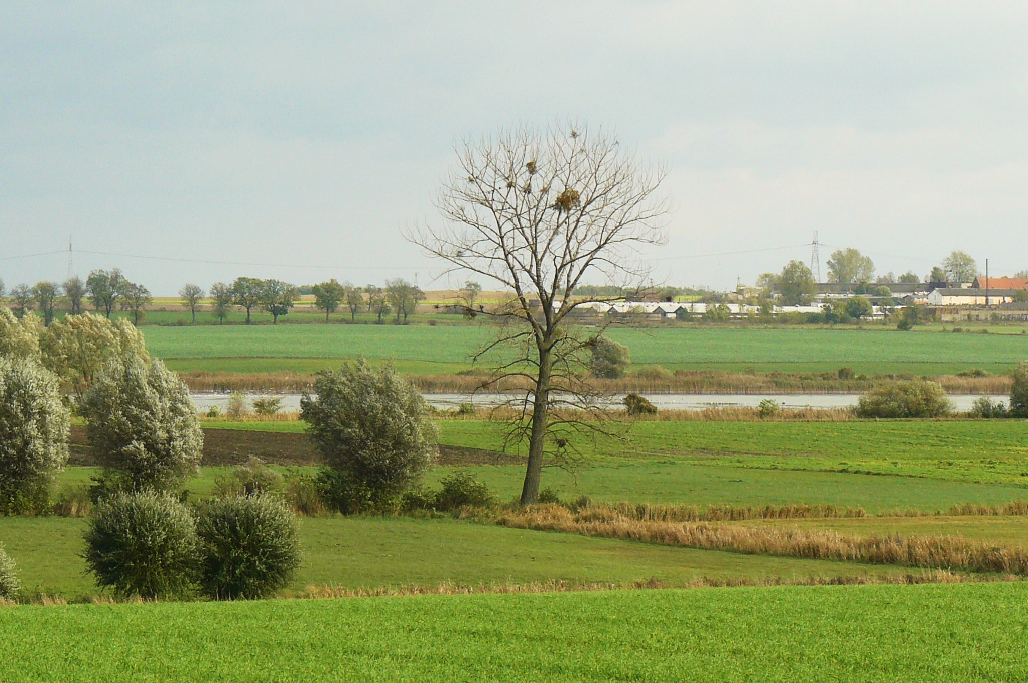 Stawy rybne - Objezierze.